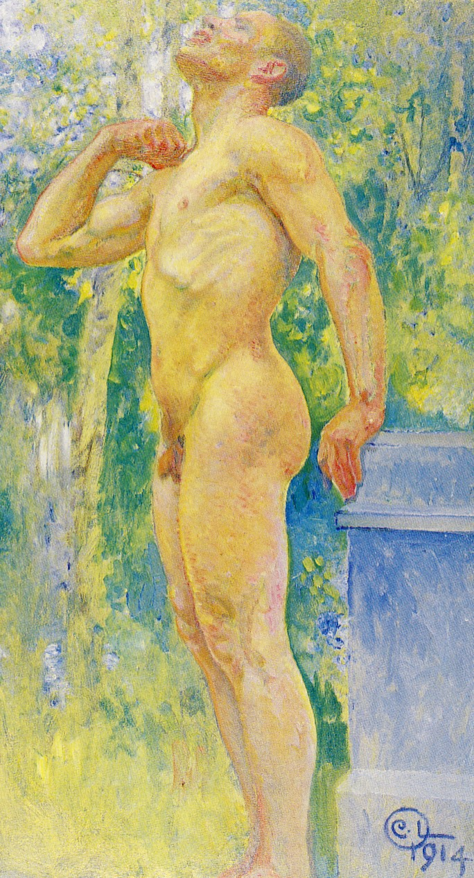 Carl Larsson, Midvinterblot, studie för kungen, 1914, olja på duk, 76,5 x 46 cm